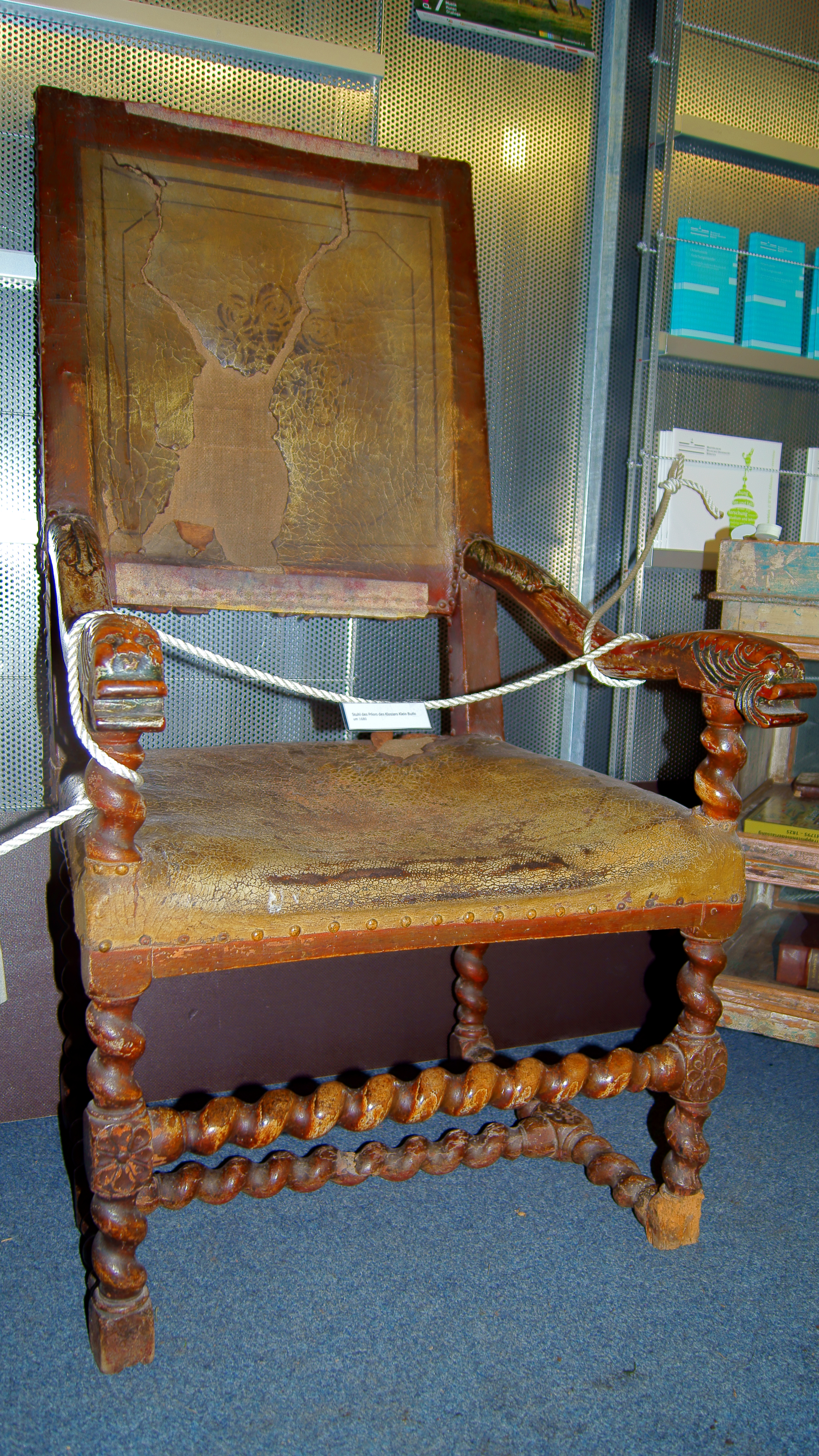 Stuhl des Priors von Kleinburlo, ca. 1680. Das ehemalige Wilhelmiten- und Zisterzienserkloster Kleinburlo zwischen Darfeld und Eggerode im Münsterland, ursprünglich ein Ableger des Klosters Mariengarden in Groß-Burlo, wurde 1803/12 aufgehoben und 1826 bis auf die immer noch im Erdreich verborgenen Grundmauern abgetragen. Vom 1804 versteigerten Inventar ist nur noch wenig vorhanden. Der hier abgebildete Lehnstuhl des Priors wurde anlässlich der "Expedition Münsterland" der Uni Münster am 12. Oktober 2013 am Originalort gezeigt.